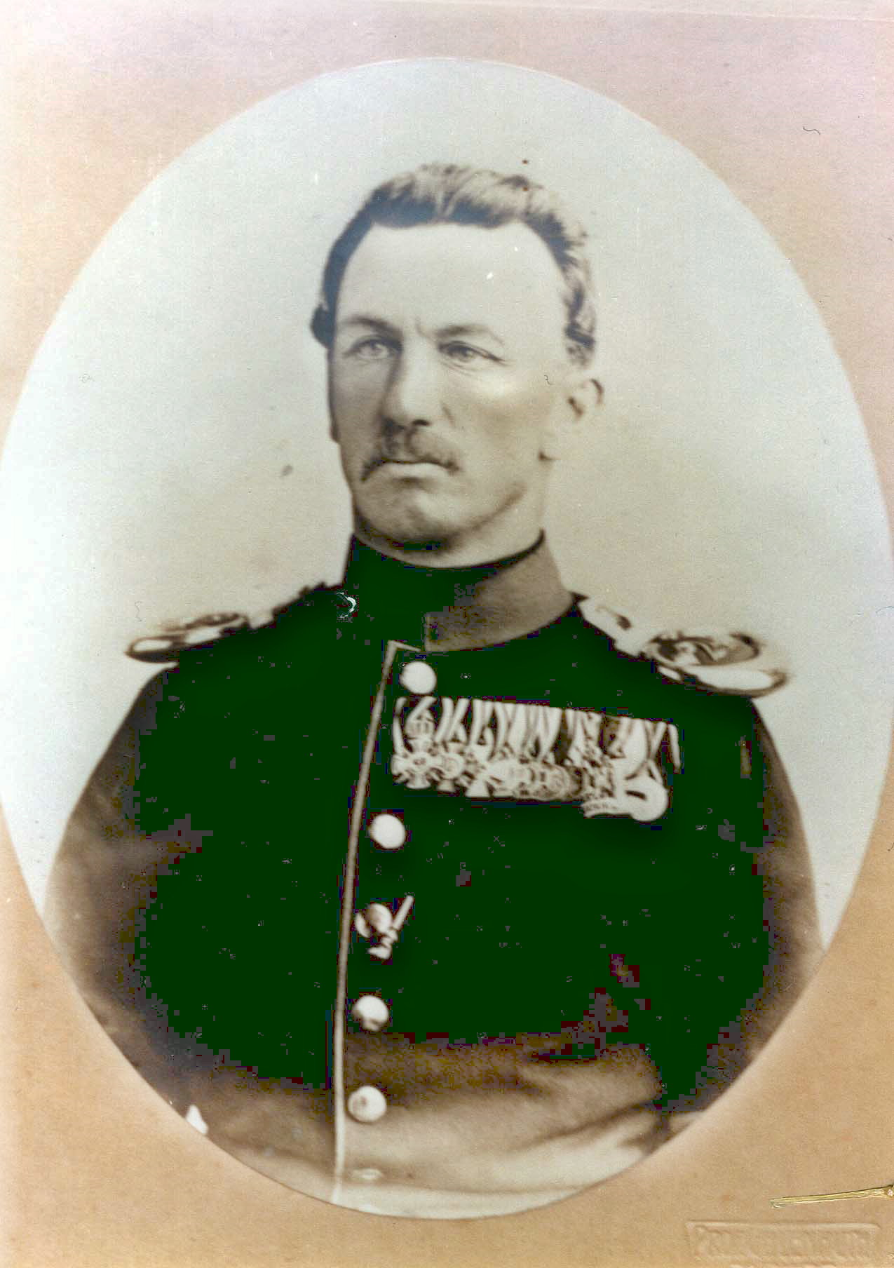 Otto v. Görschen, preußischer Oberstleutnant, hier Ablichtung eines alten Familienfotos